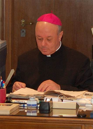 Mons. Sergio Pagano, foto dell'Archivio Segreto Vaticano